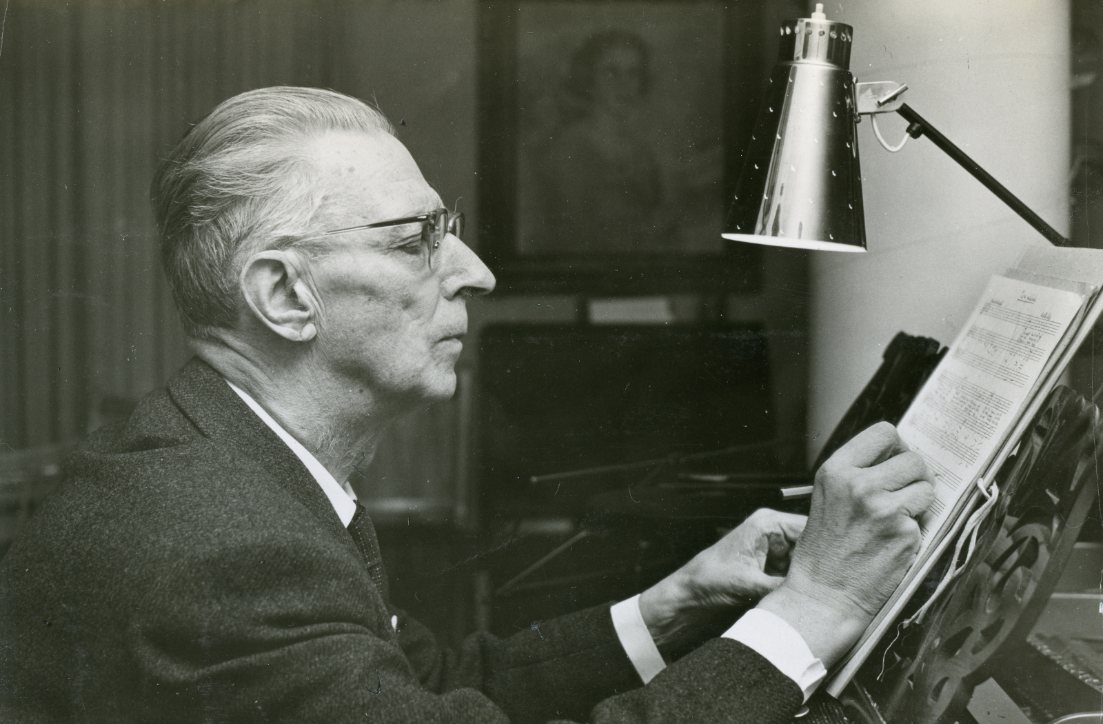 Eläkeläinen Martti Hela (1890-1965) säveltää